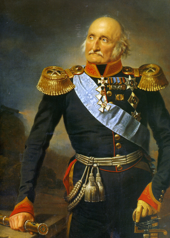 Russian field-marshal P.Ch. Wittgenstein by Franz Kruger